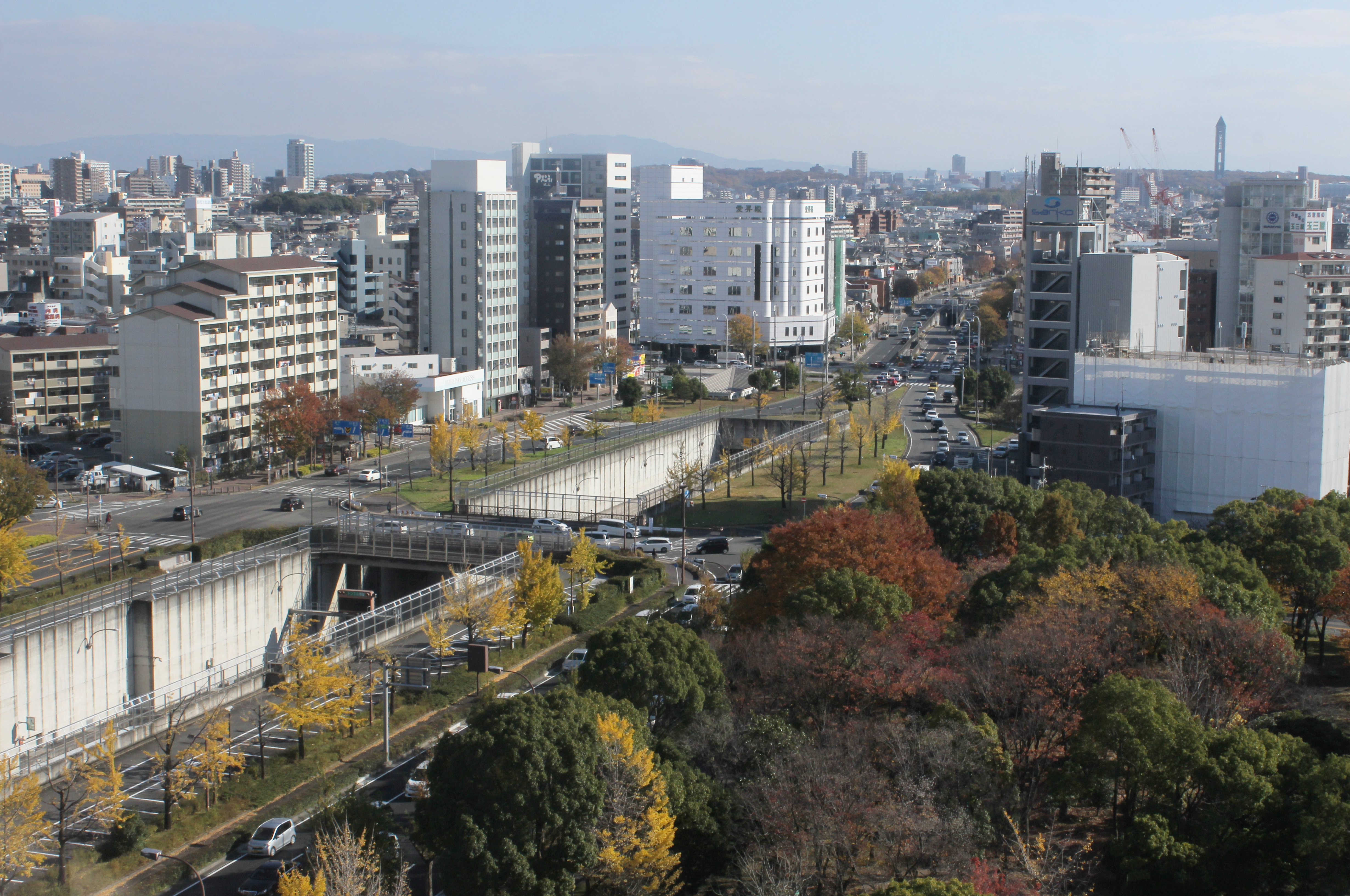 名古屋高速2号東山線 千種区吹上付近 吹上ホール9階（展望ホール）より撮影